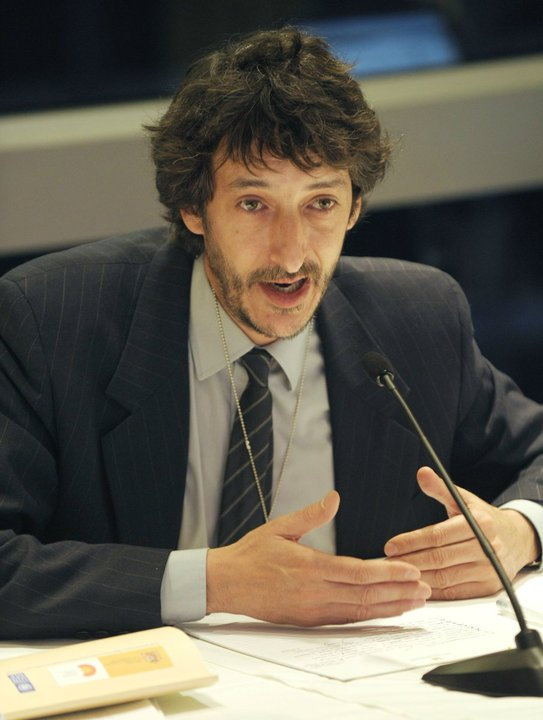 Jose Moisés Martín en Naciones Unidas en 2010